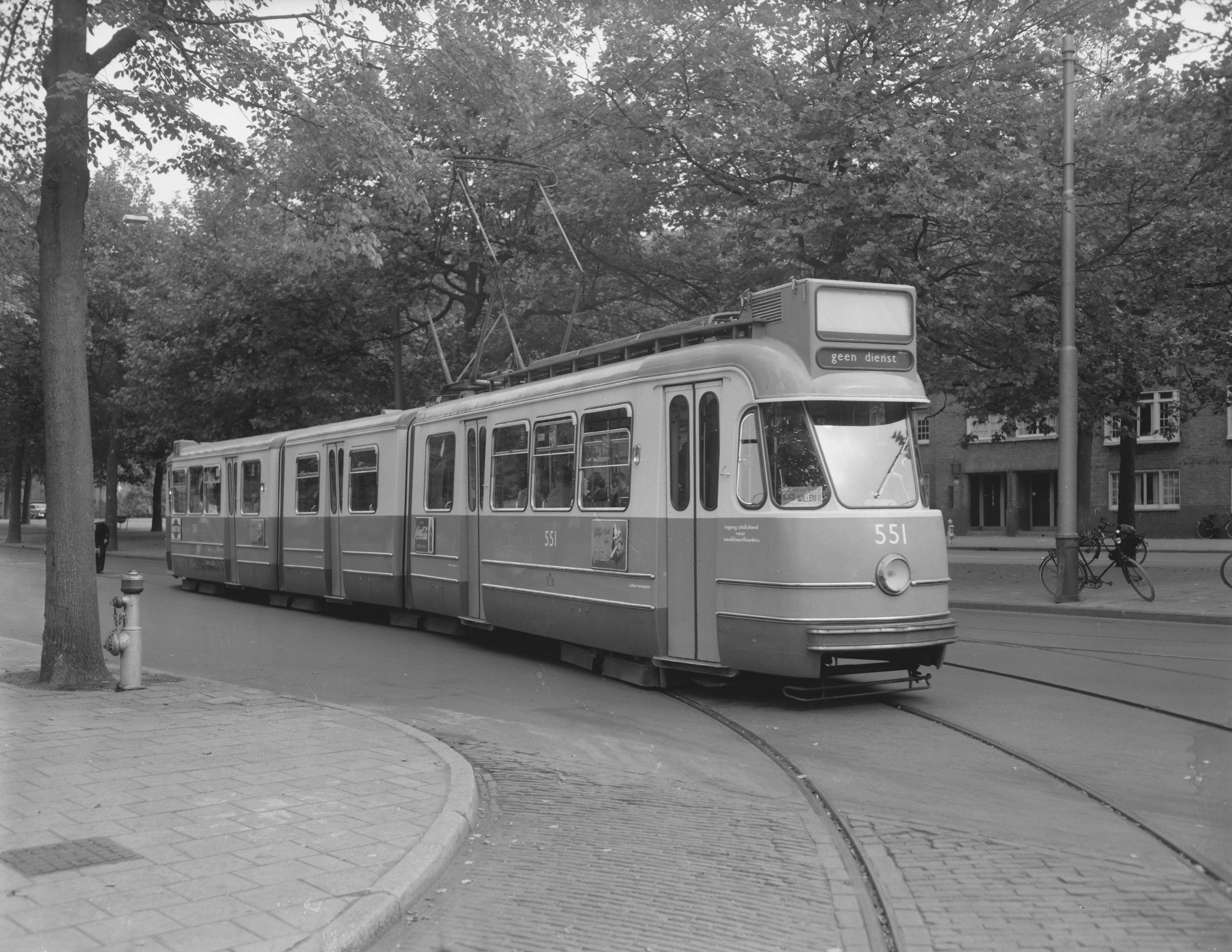 Collectie / Archief : Fotocollectie Anefo Reportage / Serie : [ onbekend ] Beschrijving : Proefrit drieledig tramstel Amsterdamse tram Locatie: Stadionplein Datum : 18 september 1958 Trefwoorden : Proefritten, TRAMS, tramstellen Fotograaf : Noske, J.D. / Anefo Auteursrechthebbende : Nationaal Archief Materiaalsoort : Negatief (zwart/wit) Nummer archiefinventaris : bekijk toegang 2.24.01.04 Bestanddeelnummer : 909-8574